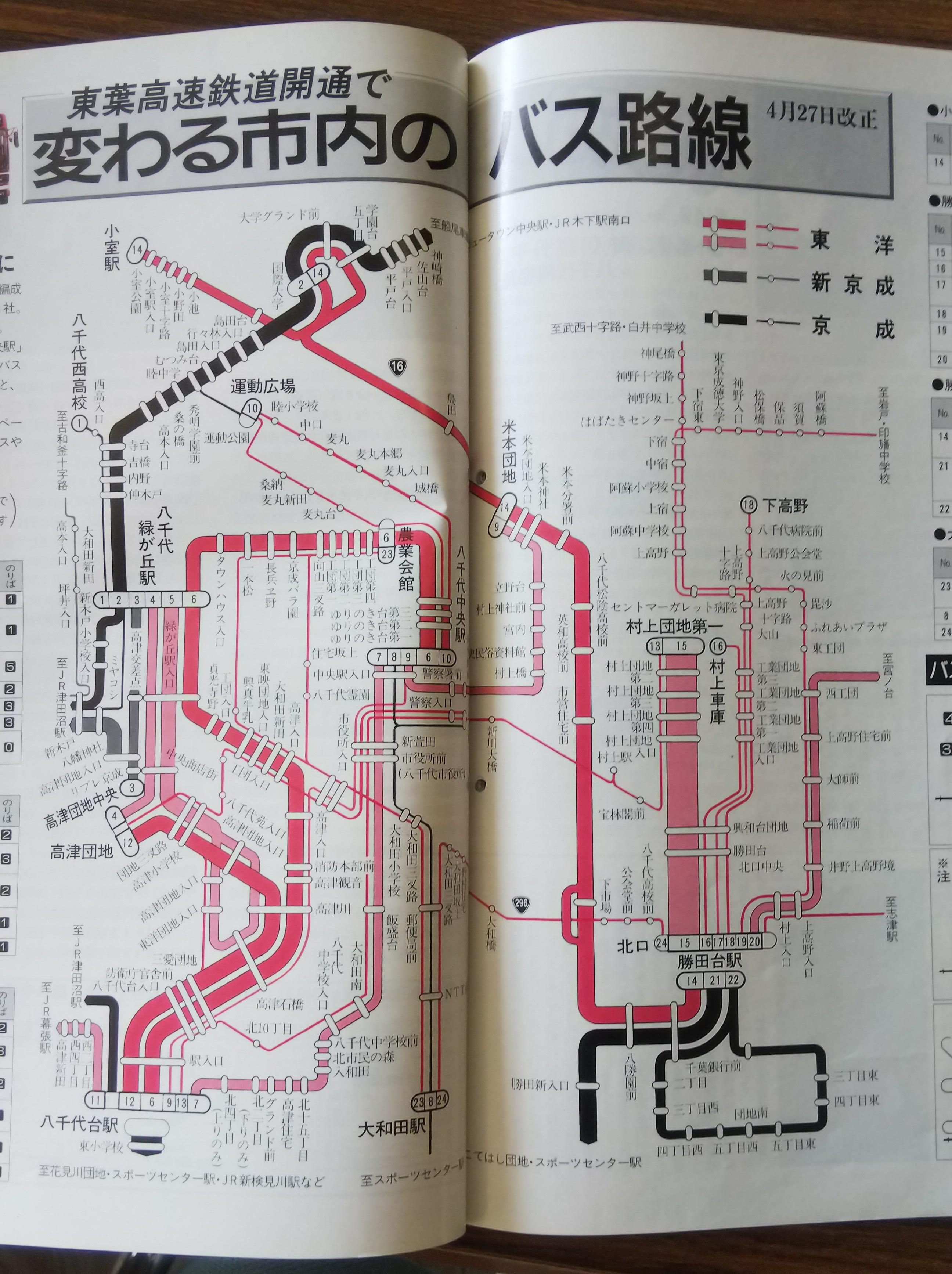 1995年、東葉高速鉄道開業当時の八千代市のバス路線網